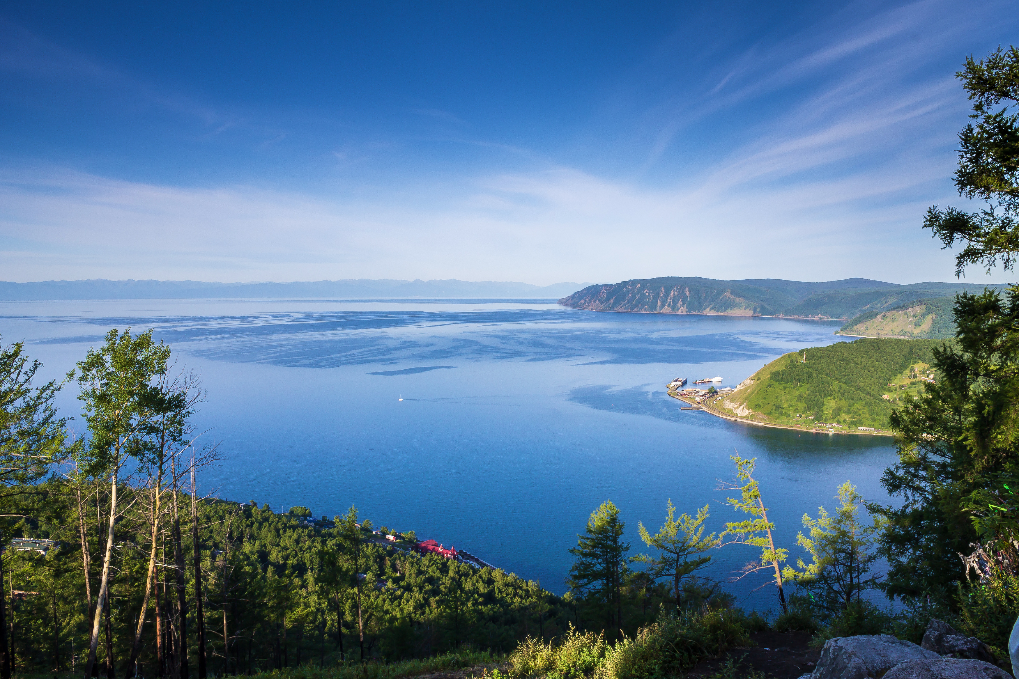 Исток реки Ангары, Иркутский район This image is related to the protected area of Russia number 3810094